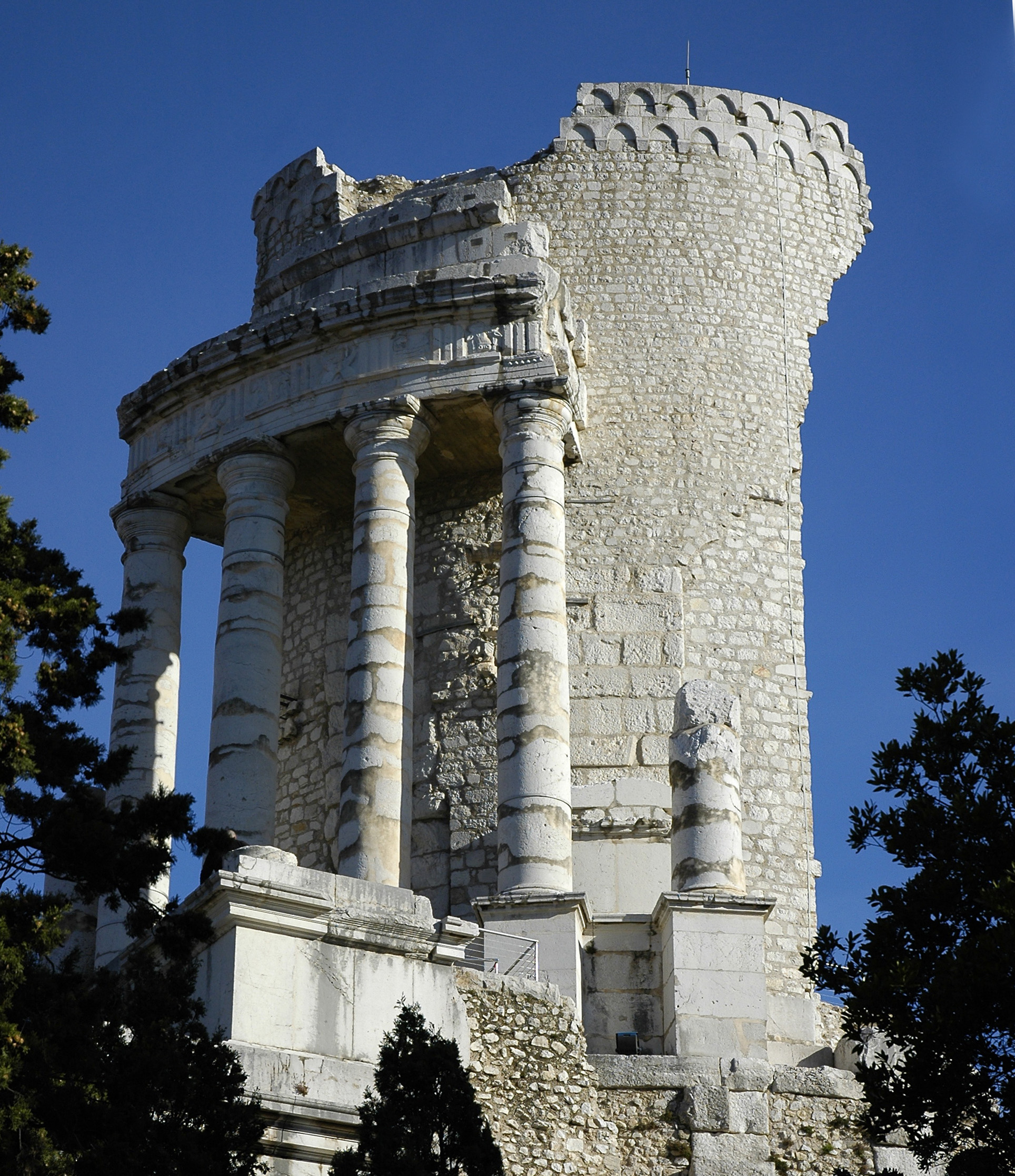 Surplombant la baie de Monaco, le trophée d'Auguste à La Turbie, un des rares édifices de ce type encore conservés aujourd'hui.